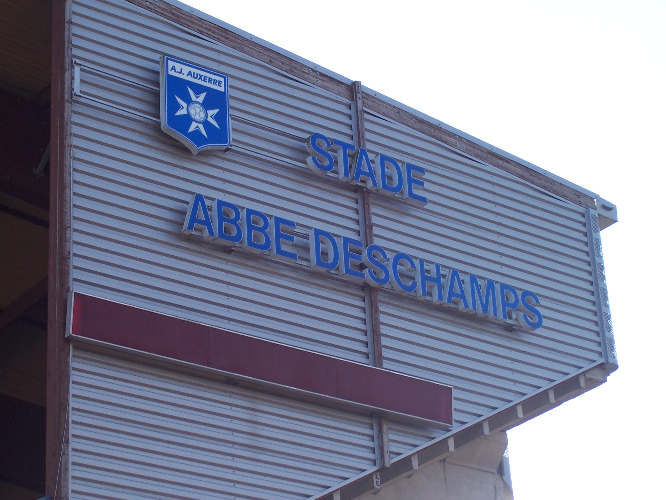 Entrée